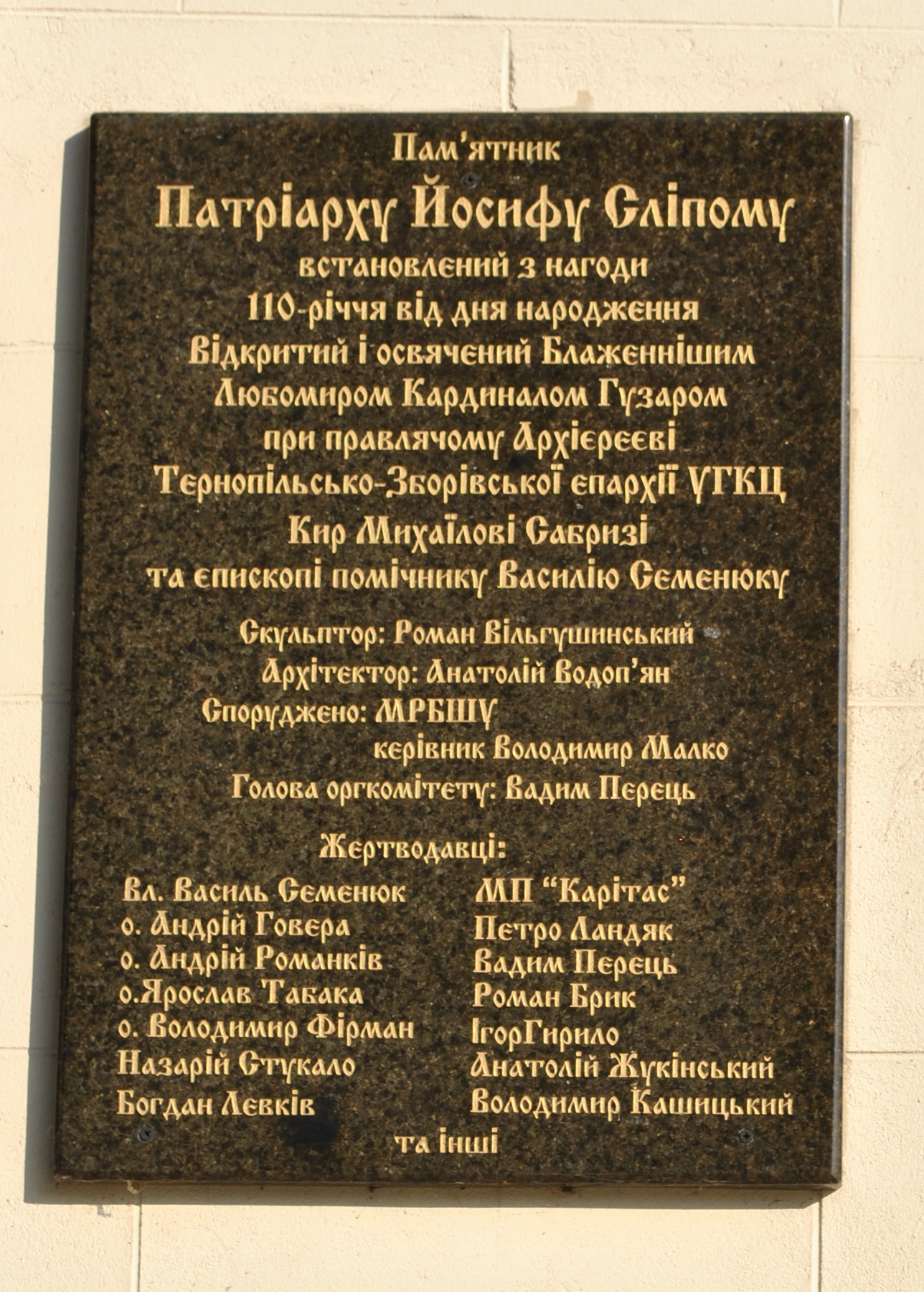 Таблиця фундаторів і доброчинців пам'ятника патріарху Йосифу Сліпому на фасаді церкви Непорочного Зачаття Пресвятої Діви Марії в Тернополі